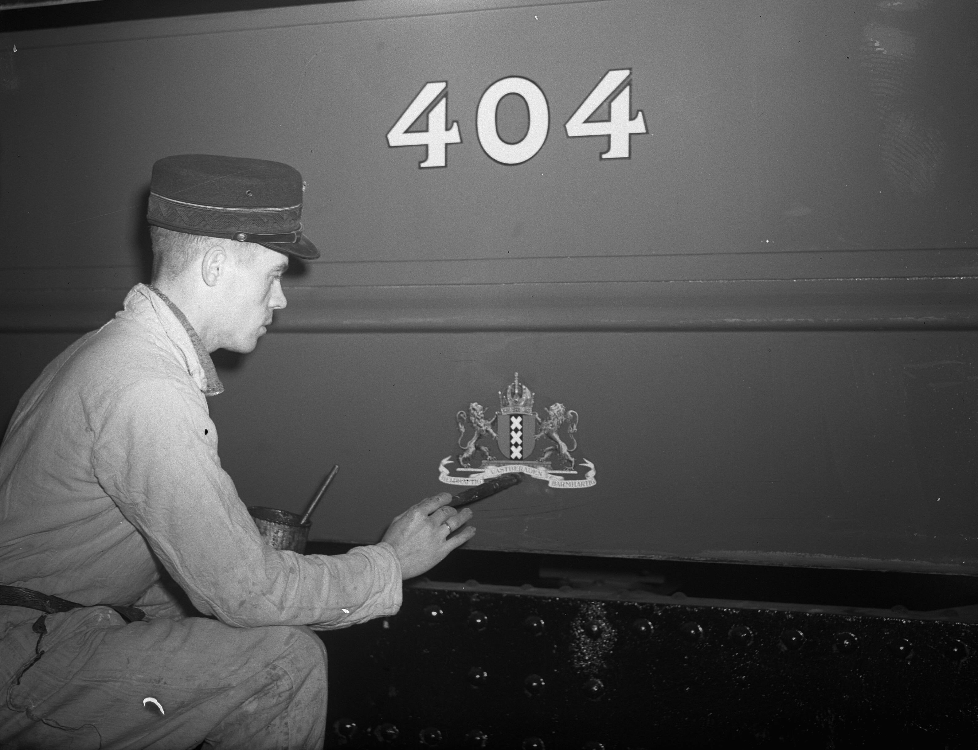 Collectie / Archief : Fotocollectie Anefo Reportage / Serie : [ onbekend ] Beschrijving : Trams krijgen nieuw stadswapen Datum : 30 november 1948 Locatie : Amsterdam Trefwoorden : heraldiek, openbaar vervoer, trams Fotograaf : Bilsen, Joop van / Anefo Auteursrechthebbende : Nationaal Archief Materiaalsoort : Glasnegatief Nummer archiefinventaris : bekijk toegang 2.24.01.09 Bestanddeelnummer : 903-1191